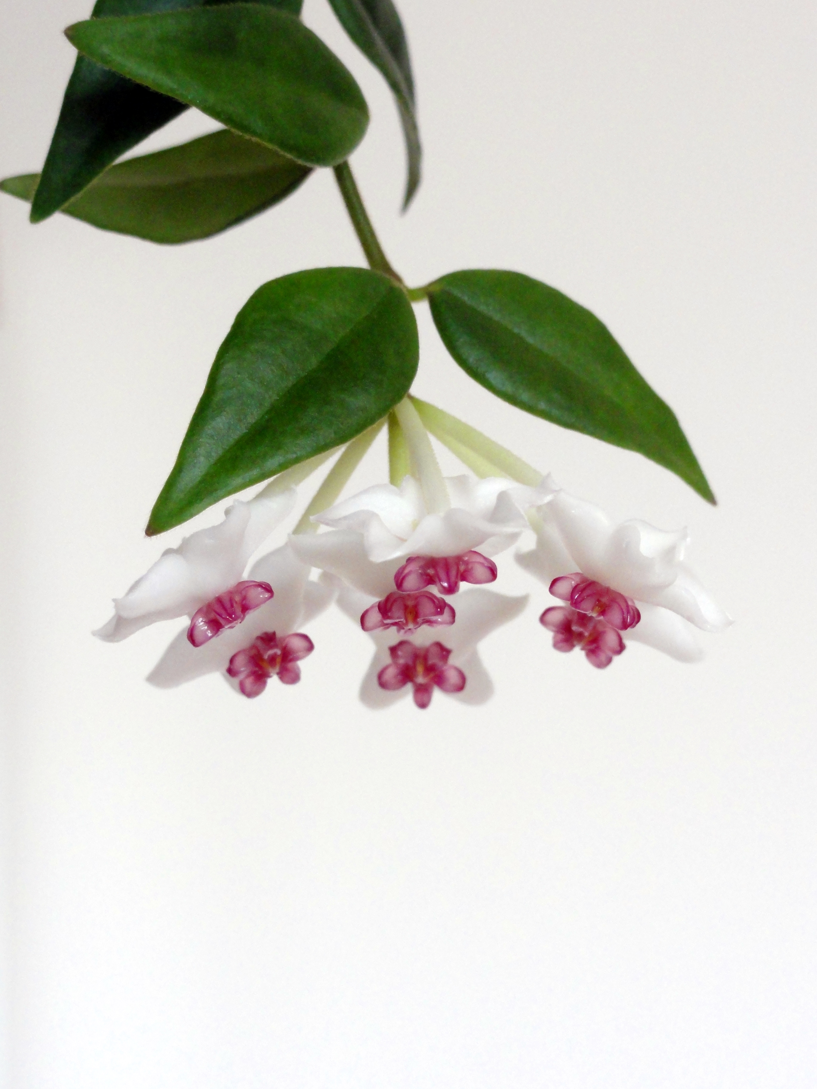 Hoya Bella